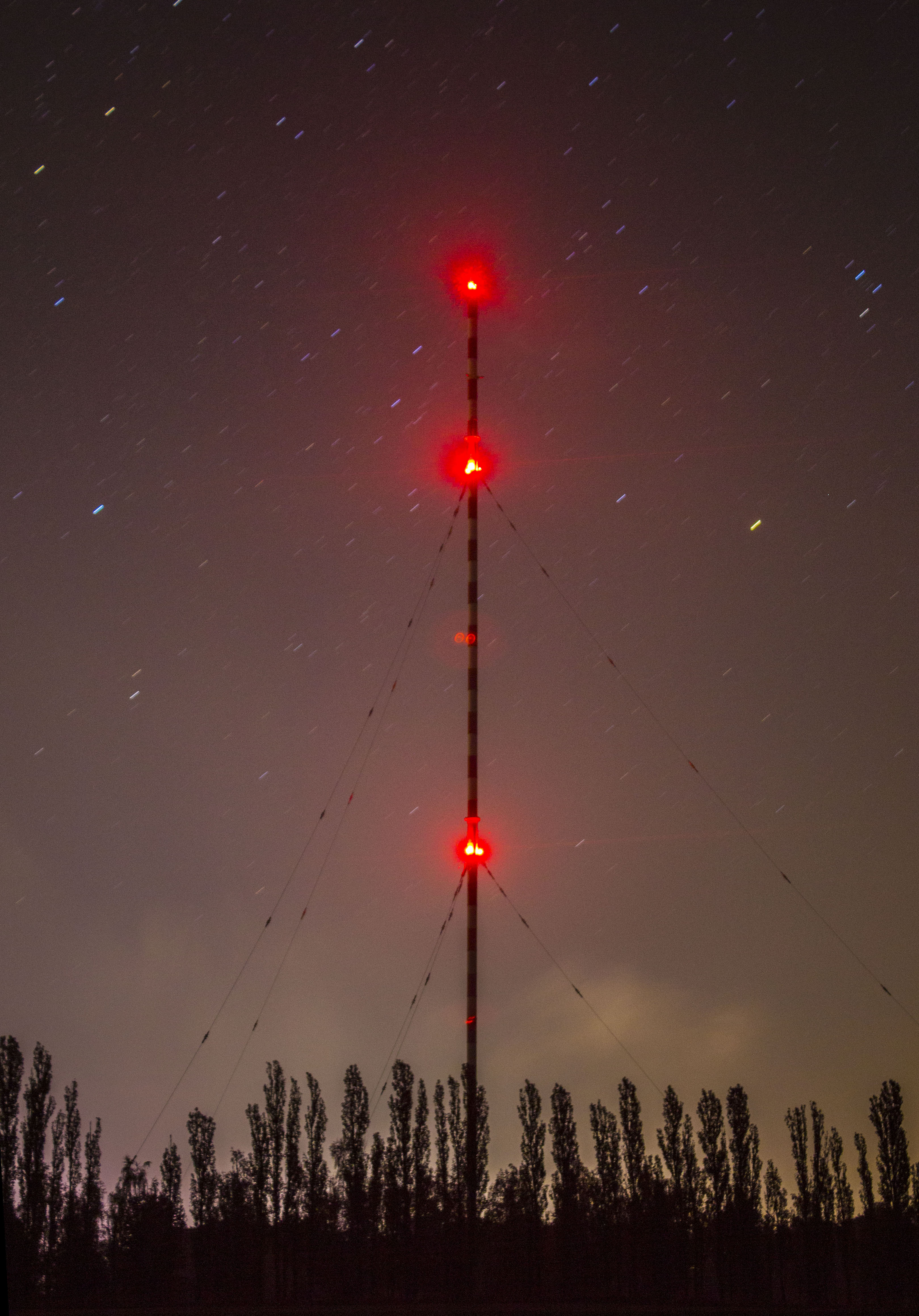 Der Rohrmast des Rundfunksenders Willsdruff bei Nacht. Gut zu erkennen ist die Befeuerung mit einer Leistung von je 1 KW.